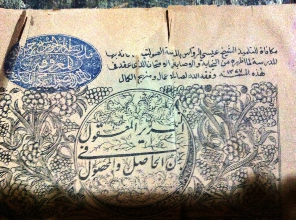 مكافأة نالها الشيخ عيسى رواس من المدرسة الصولتية بمكة المكرمة عام 1327هـ